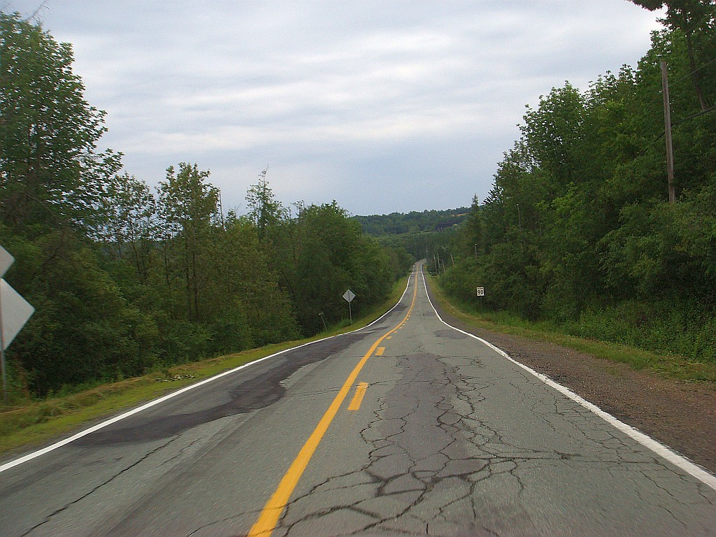 Photo de la route 108, à North Hatley, Québec, Canada.